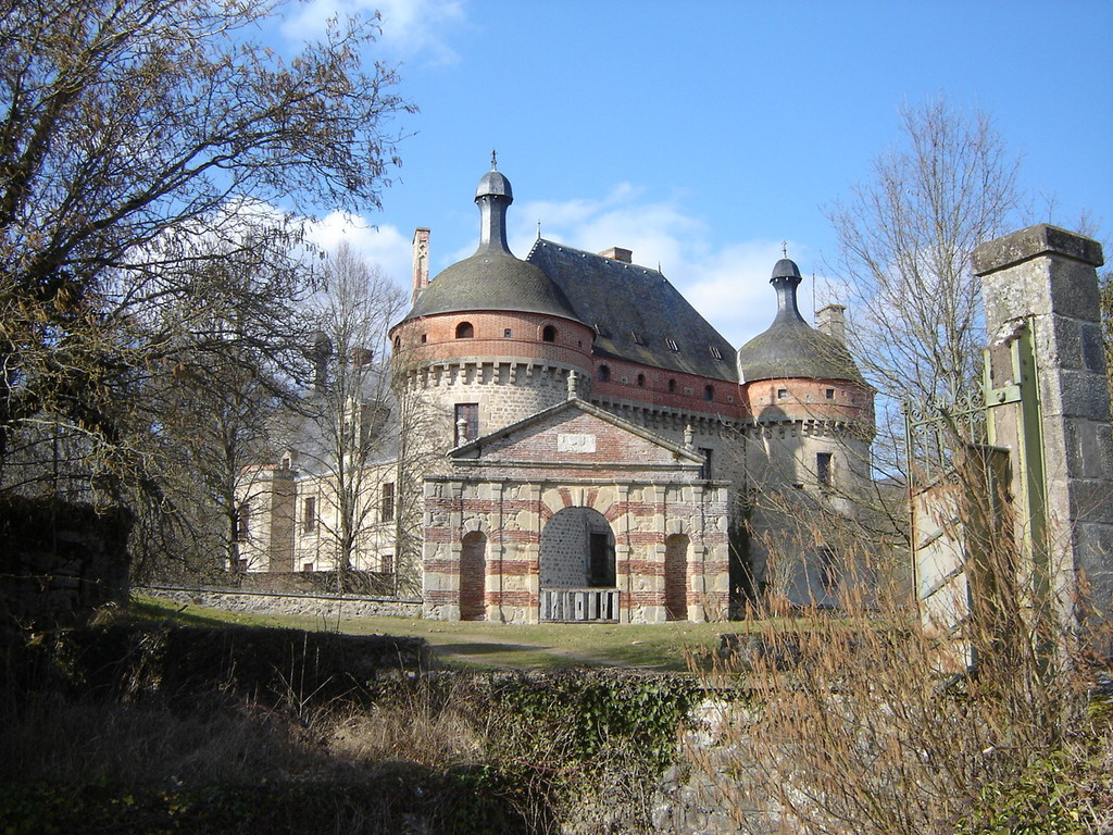 extérieur du château